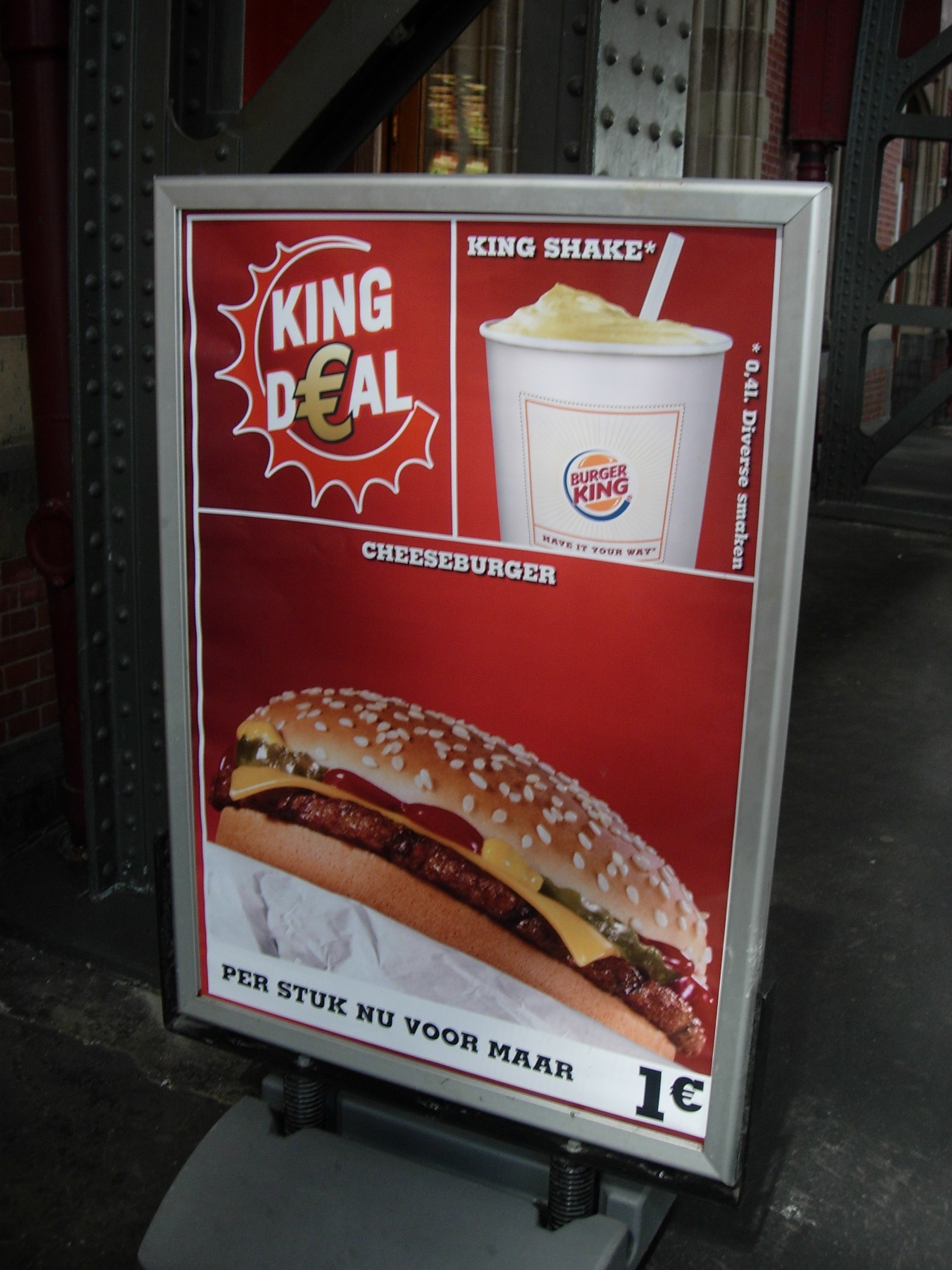 荷蘭漢堡王一歐元促銷商品燈箱海報。